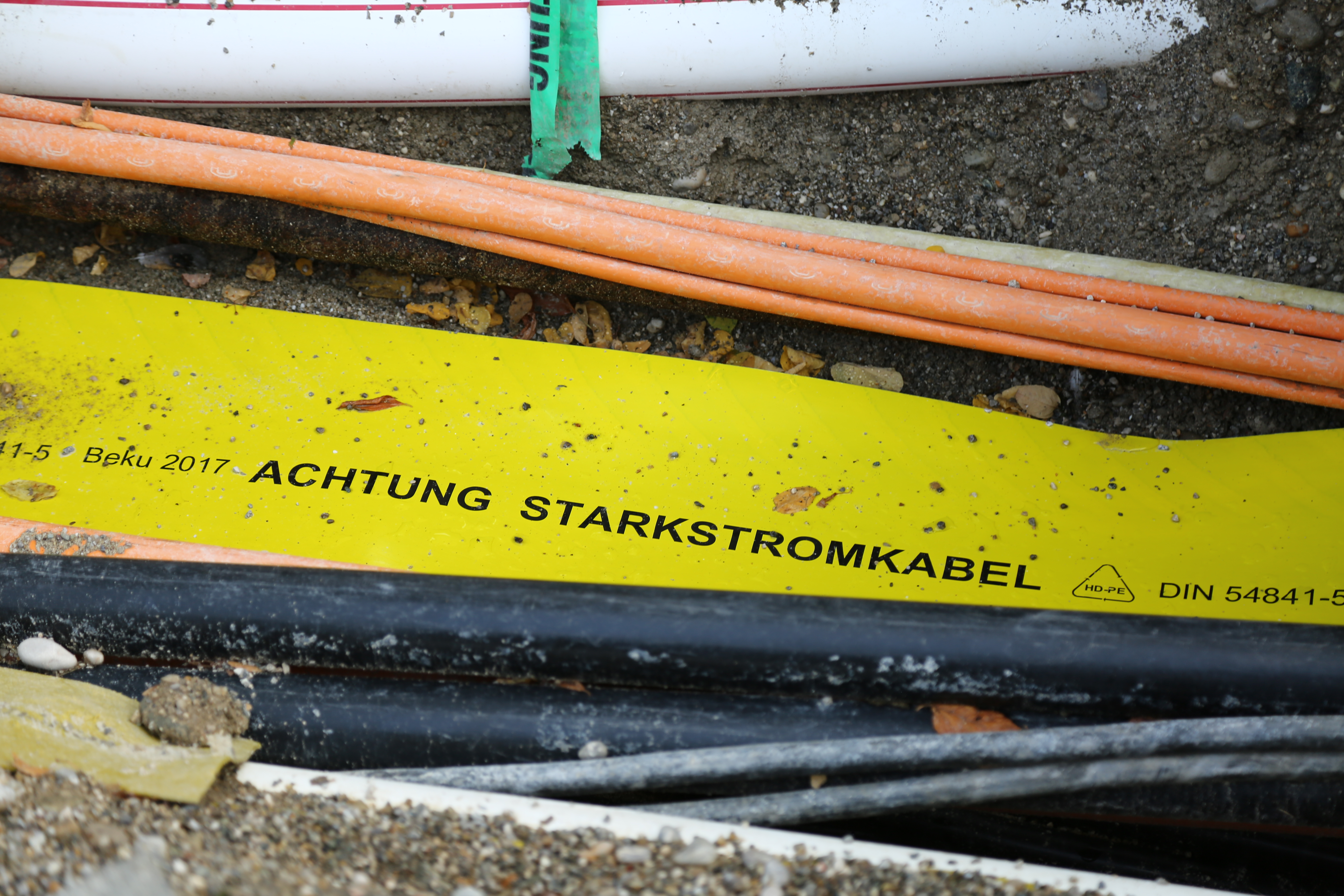 Warnband für Mittelspannungskabel im städtischen Raum. München - Altstadt